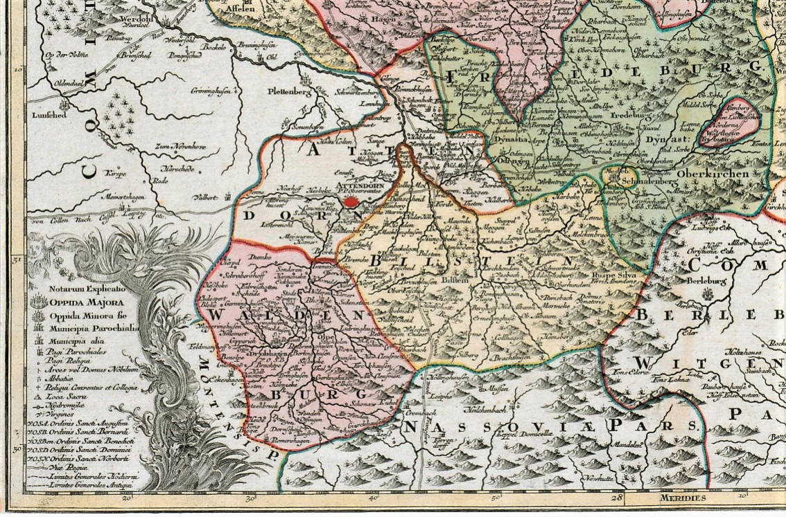 Herzogtum Westfalen, Kartenausschnitt der Territorialkarte „Ducatus Westphalia nova mappa geographica“ (1725). Beschreibung: „3 dt. Meilen = 9,8 cm – 47,5 x 55 – kolorierter Stich: Matthäus Seutter, Augsburg – B Nr. 358“. Abgebildet das Gericht Attendorn und die Ämter Bilstein und Waldenburg.